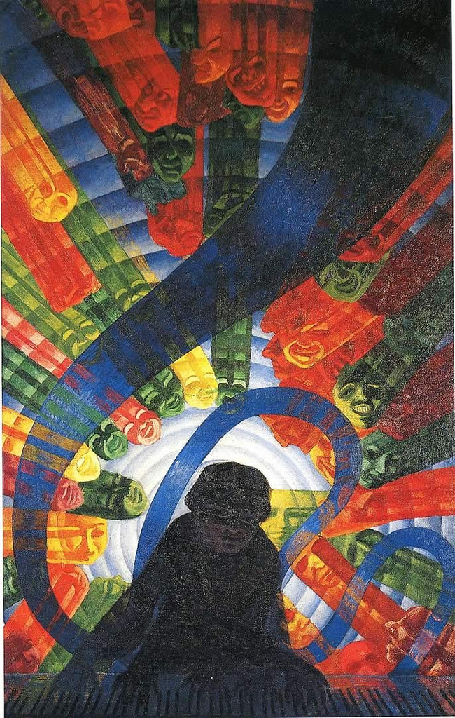 Luigi Russolo, La musica. Représentation de la vision futuriste d'un pianiste et de son public. On devine ses multiples mains rendues visibles par un procédé d'analyse de l'image.